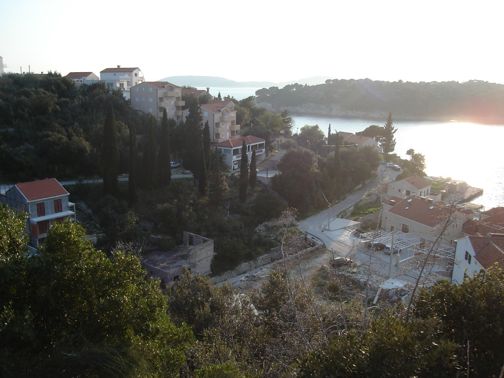 Croatian Village Štikovica near Dubrovnik